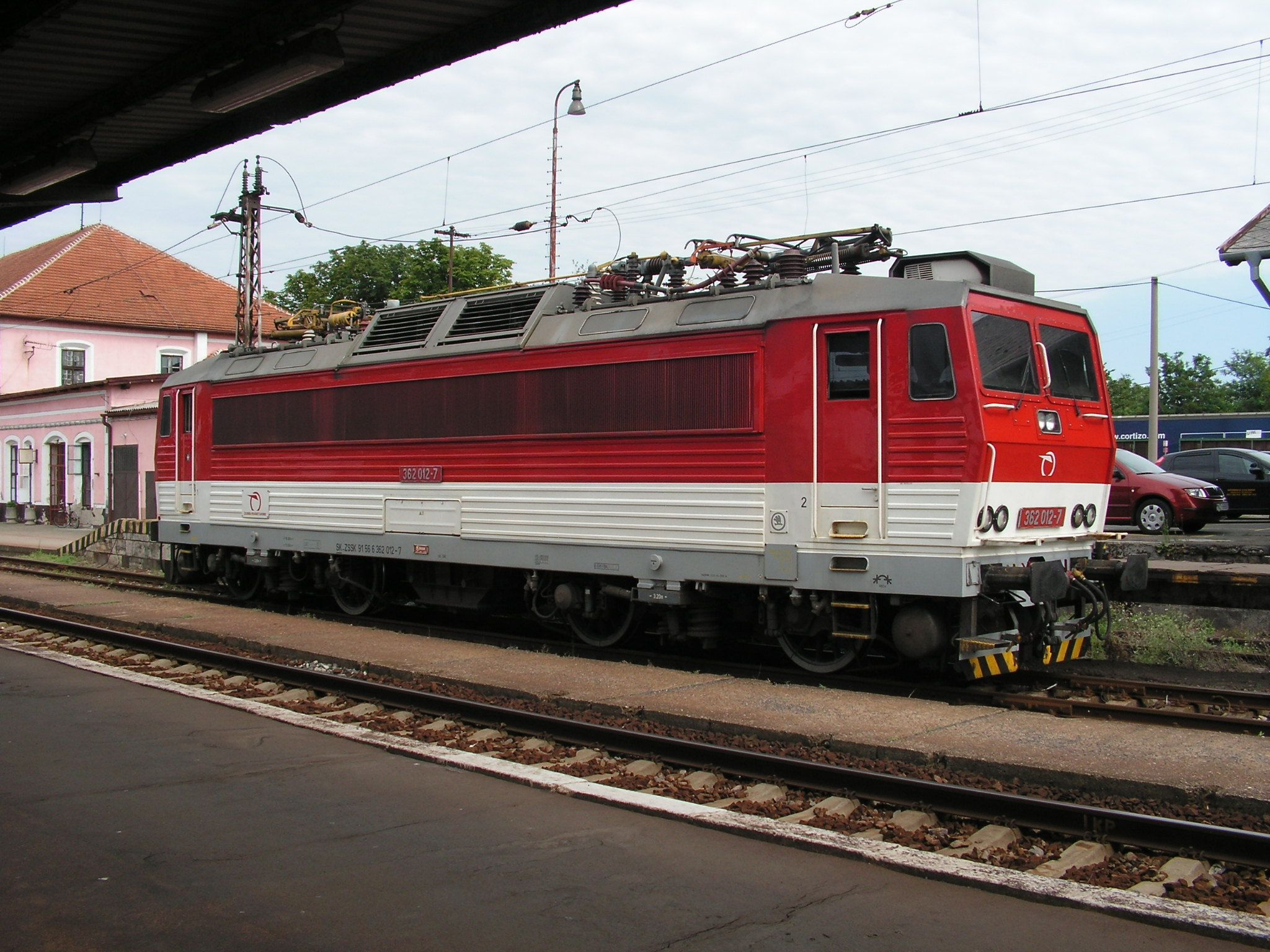 SK-ZSSK 91 56 6 362 012-7